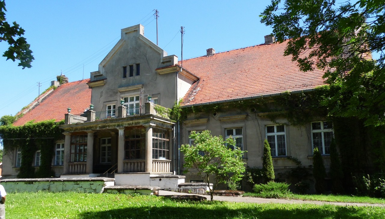 ZABYTKOWY PAŁAC.